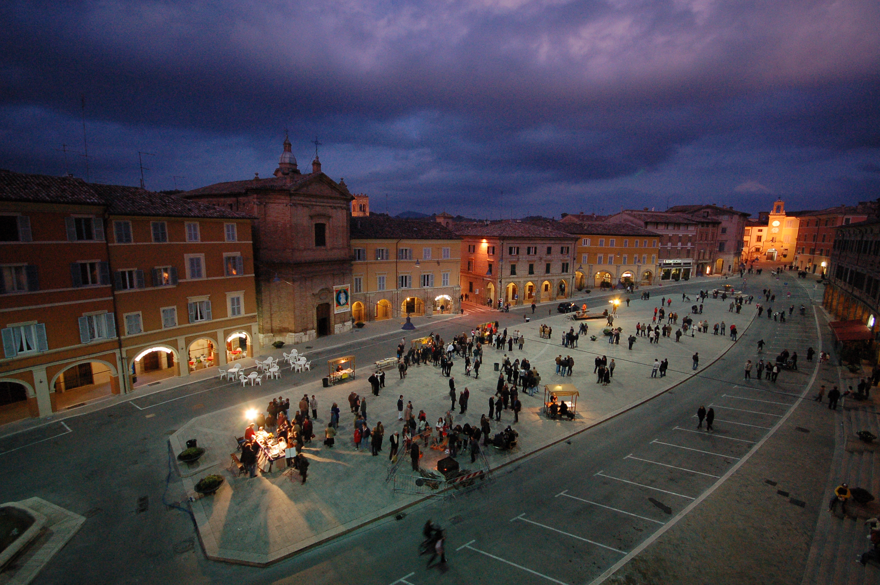 Piazza del Popolo This is a photo of a monument which is part of cultural heritage of Italy.